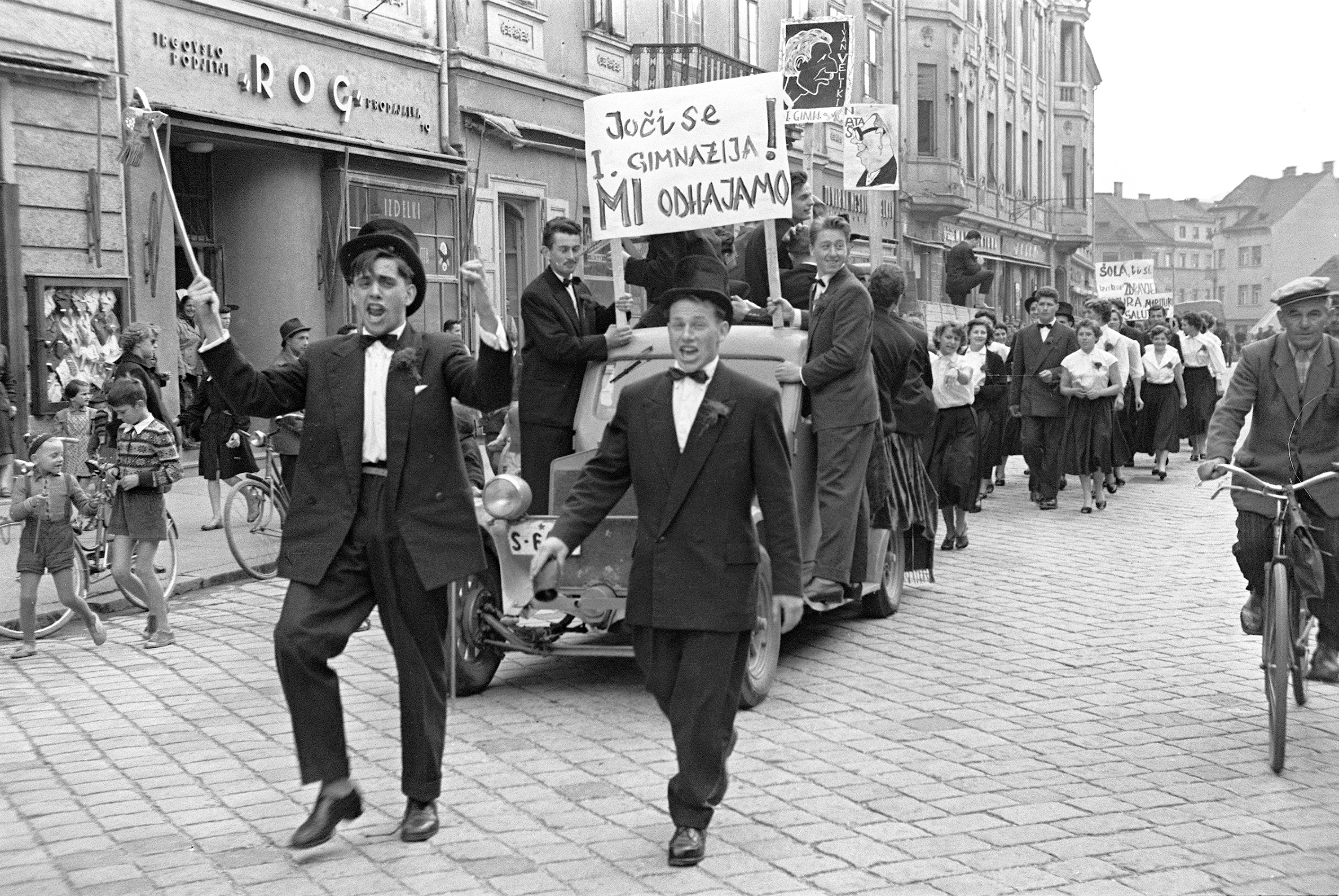 Bivši dijaki osmega razreda Prve gimnazije v sprevodu po mestu, Maribor.